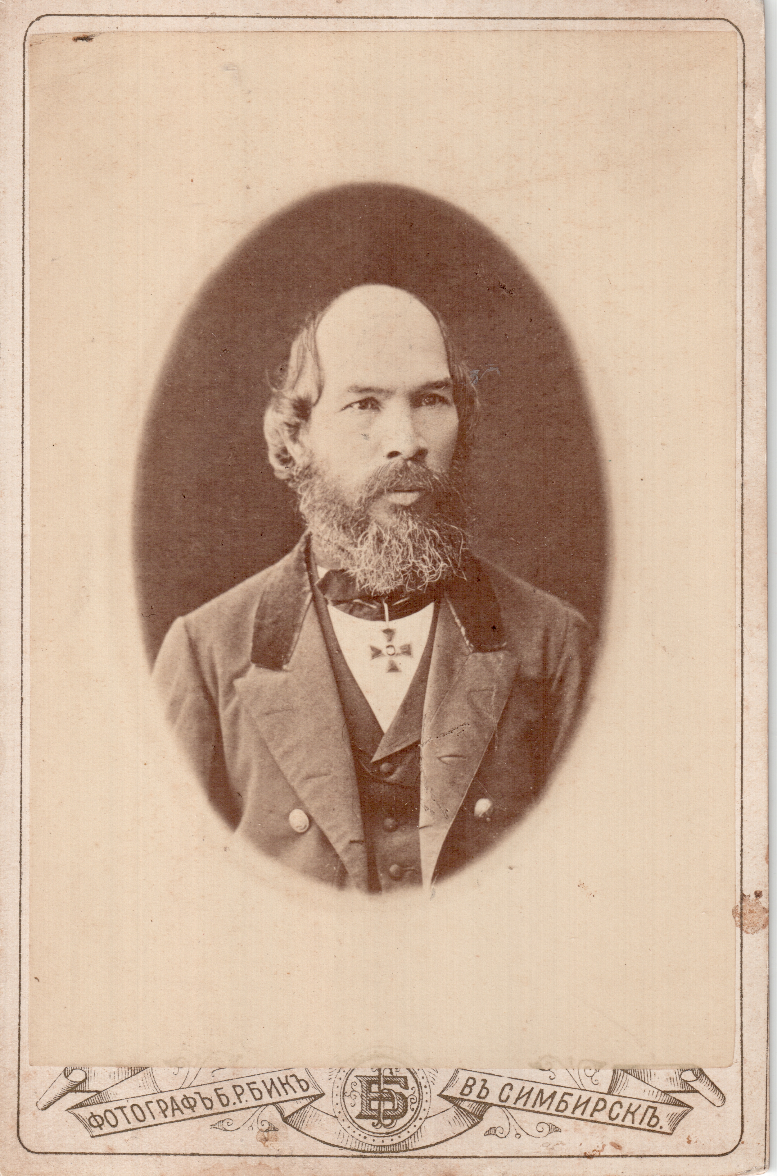 Директор народных училищ Симбирской губернии И.Н. Ульянов